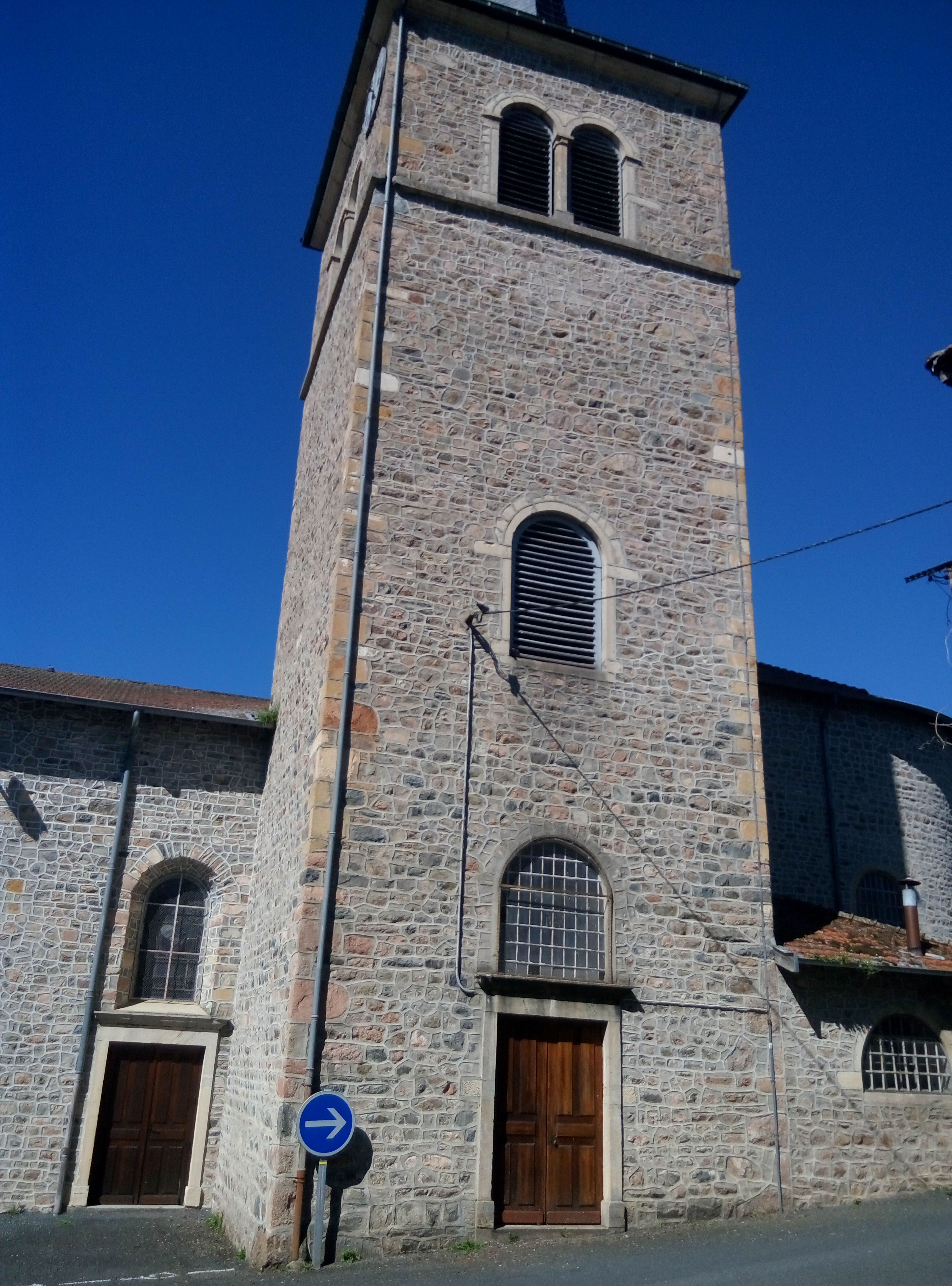 Clocher de l'église Saint-Martin de Lamure-sur-Azergues (Rhône, France).